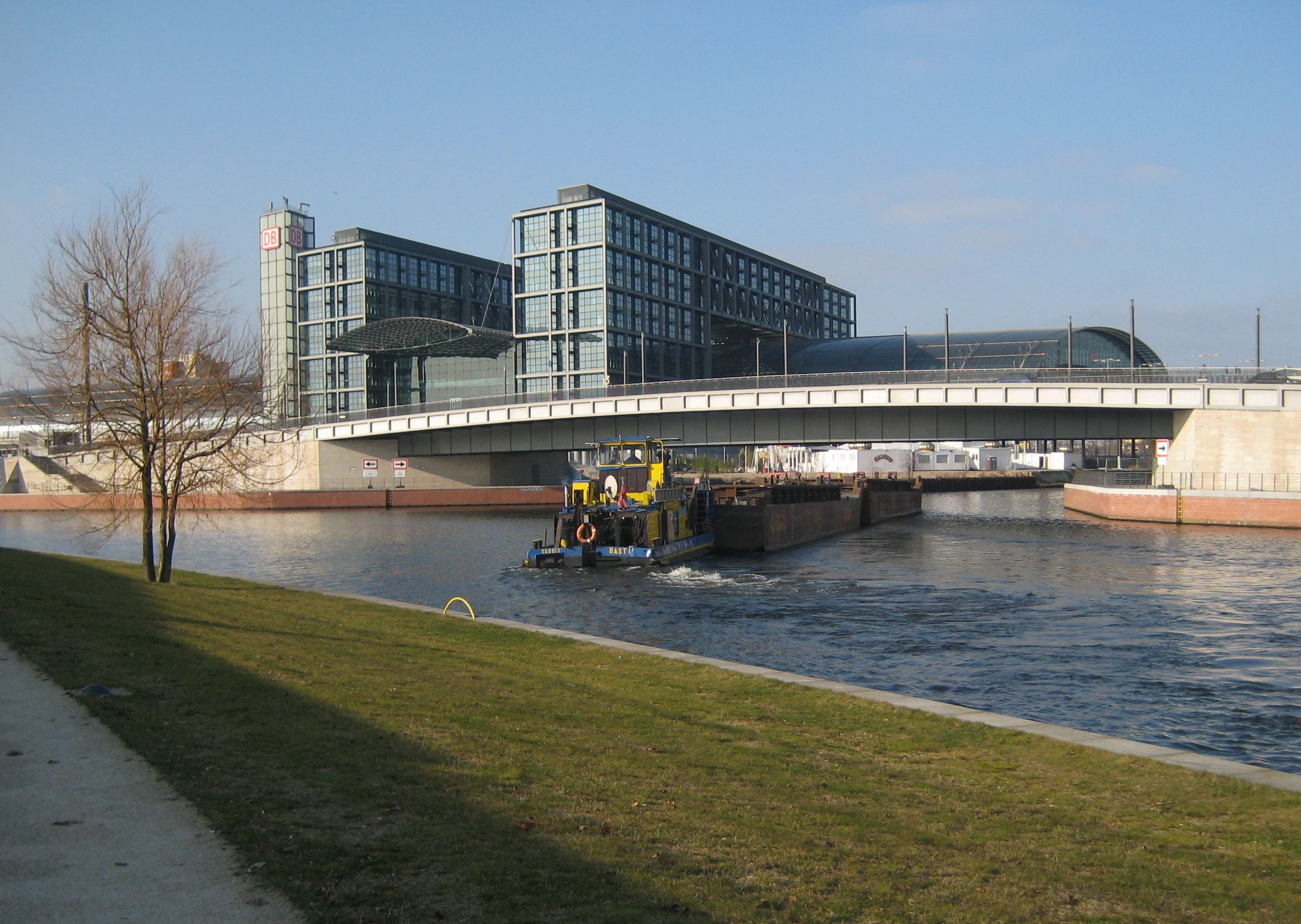 a ship steering into Berlin-Spandauer-Schiffahrtskanal at Spreebogen in Berlin